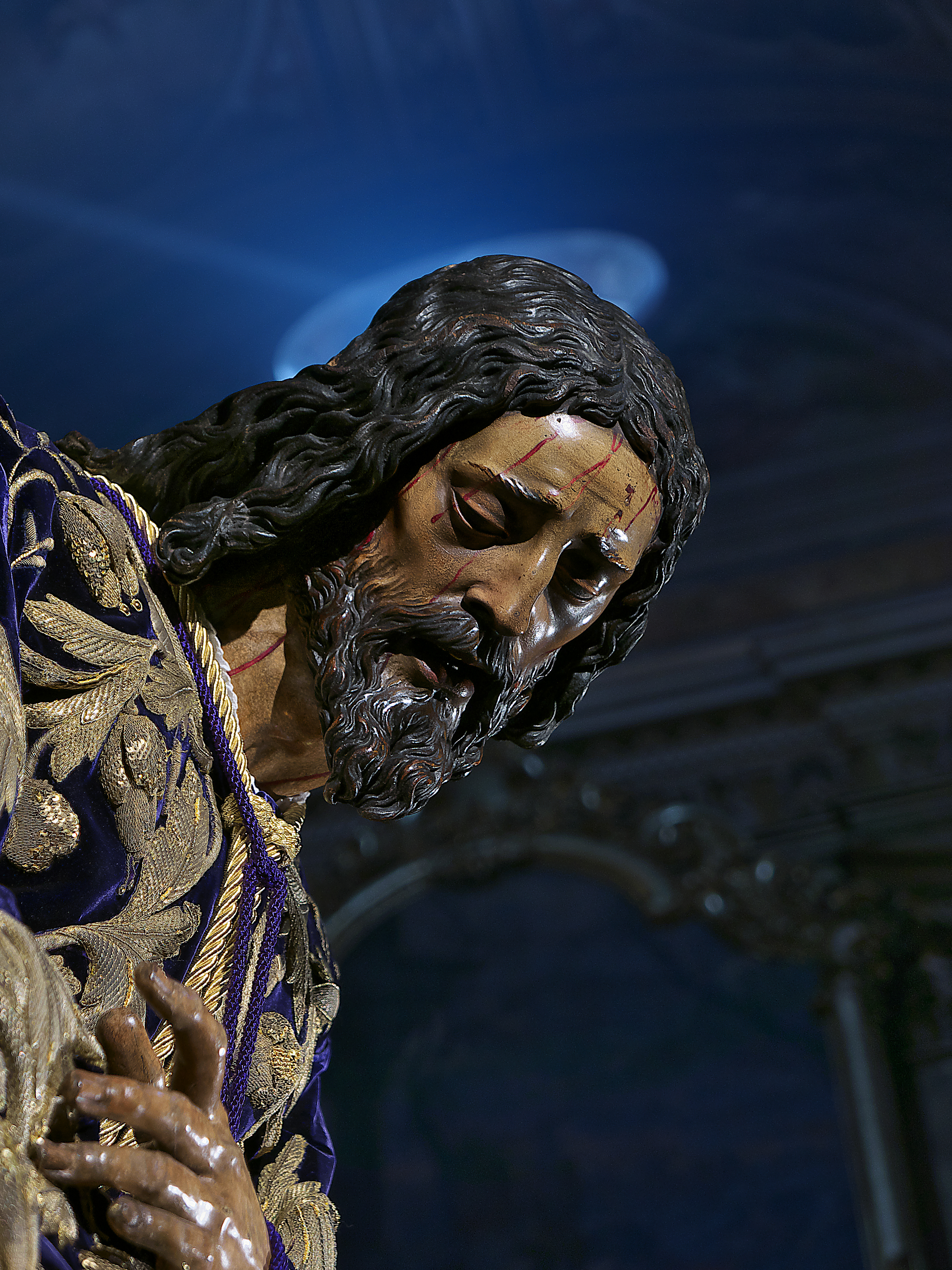 Imagen titular de la Hermandad de Pasión (Sevilla).